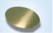 MoCu-Wafer für LED-Chips